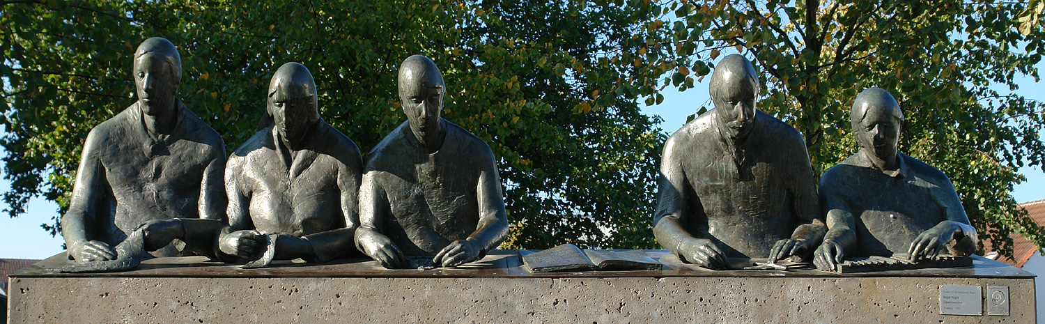 Zigarrenmacher. An einem Tisch sitzen fünf Zigarrenmacher, vor ihnen liegt ein aufgeschlagenes Buch, auf welchem etwas über das Leben und die schweren Arbeitsbedingungen des Berufsstandes zu lesen ist. Aufstellungsort: Buntentorsteinweg. Errichtet: 1984. Material: Halbfiguren, Bronze, 1,85 m x 3,5 m x 0,75 m. Entwurf und Ausführung: Holger Voigts k: kunst im öffentlichen raum bremen